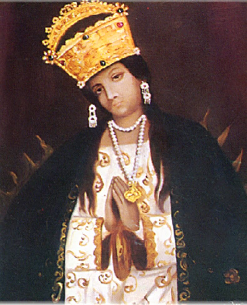 Imagen de la milagrosa Morenita de Güicán - Boyacá